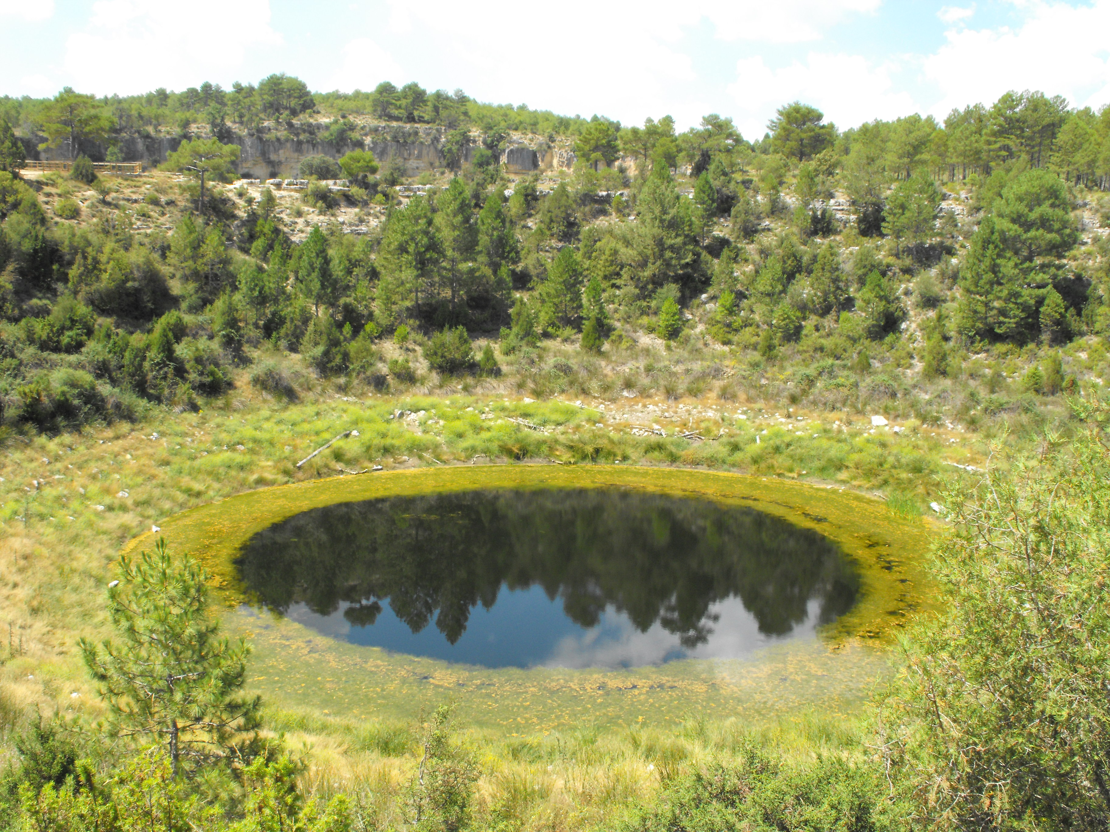 Lagunilla Tejo - Cuenca - Spain